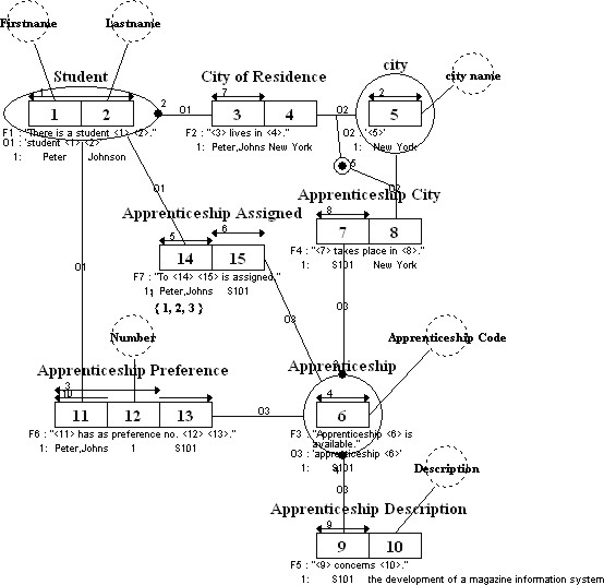 Completer model met beperkingsregels volgens FCO-IM